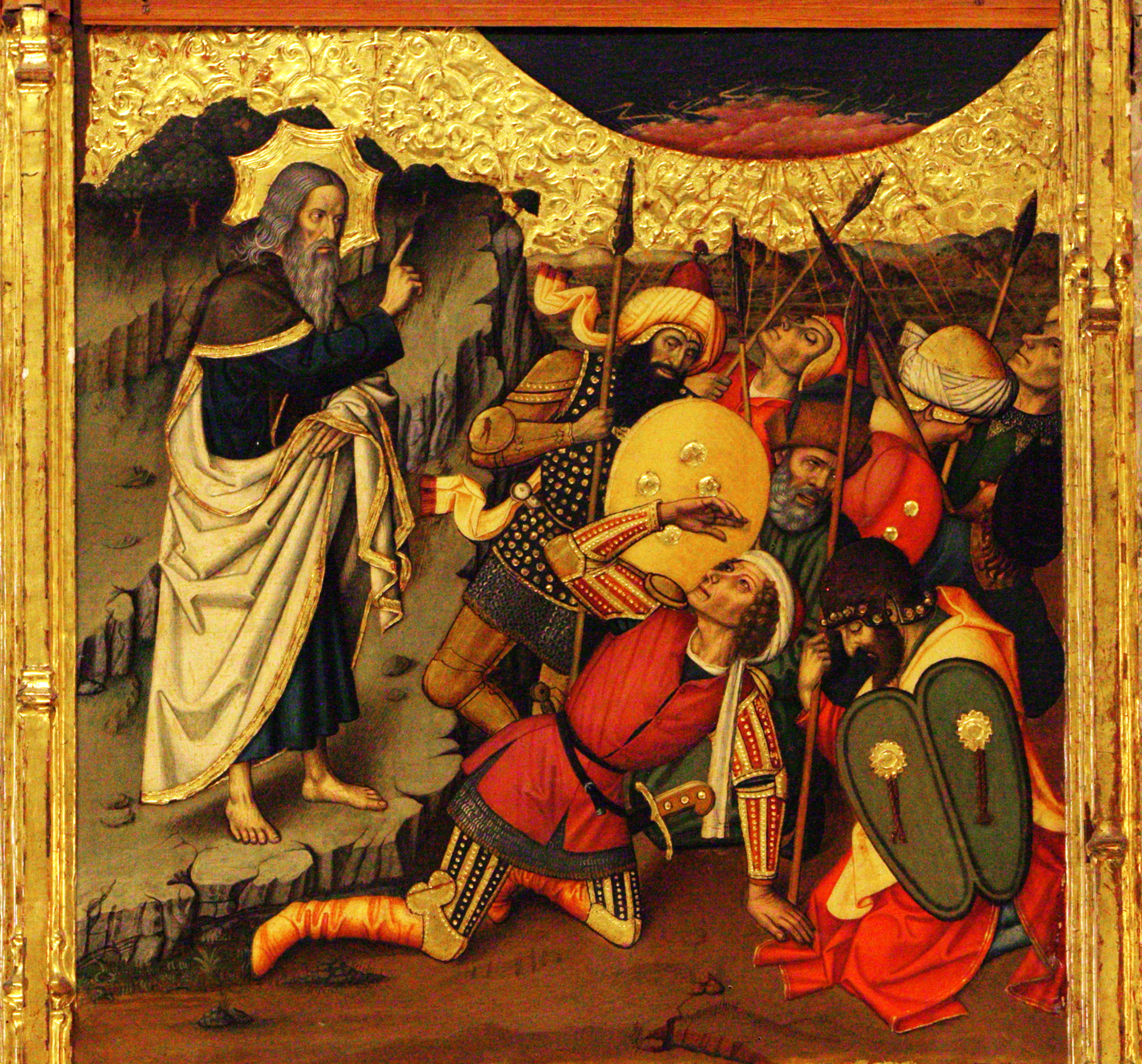 Taula de la mort dels missatgers del rei Ahazià del “Retaule de la transfiguració” de Jaume Huguet a la sala de l´antic refectori dels canonges, de la catedral de Tortosa. La seva ubicació original era a la capella central de la girola, darrera l'altar major.